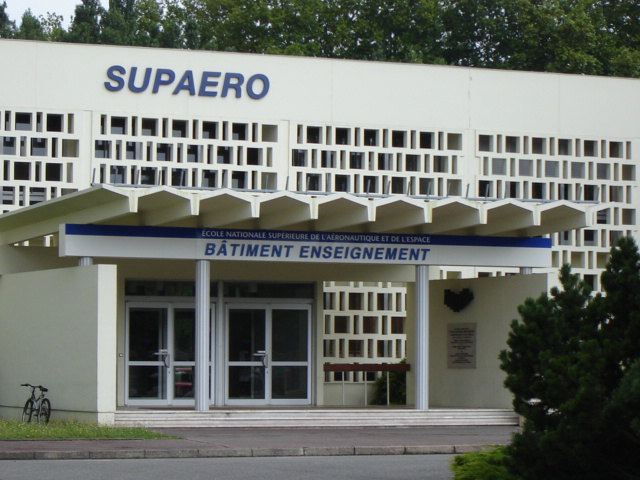 SUPAERO Ecole